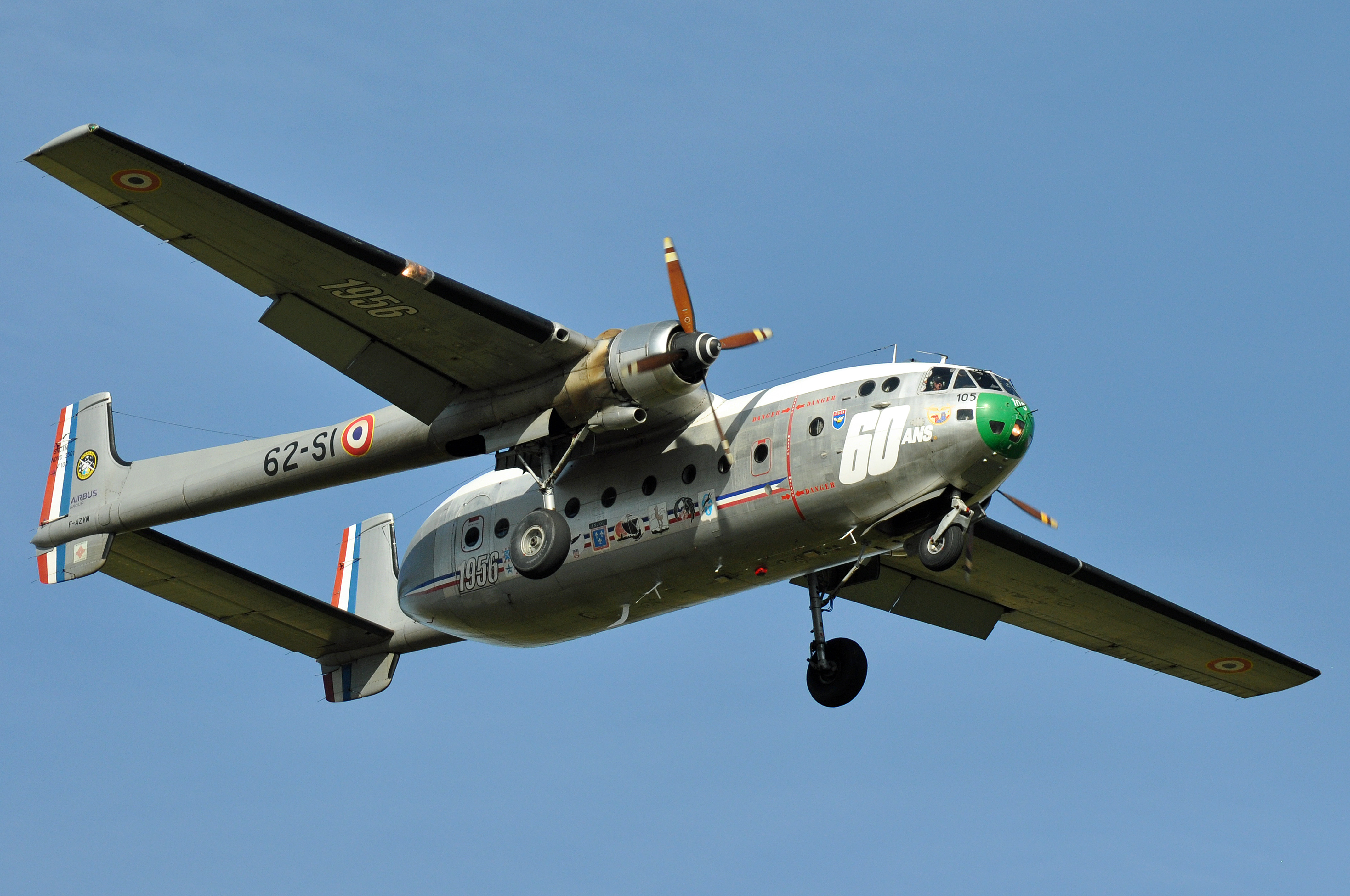 NORATLAS 62-SI PARISAIRLEGEND 2018 AERODROME MELUN-VILLAROCHE